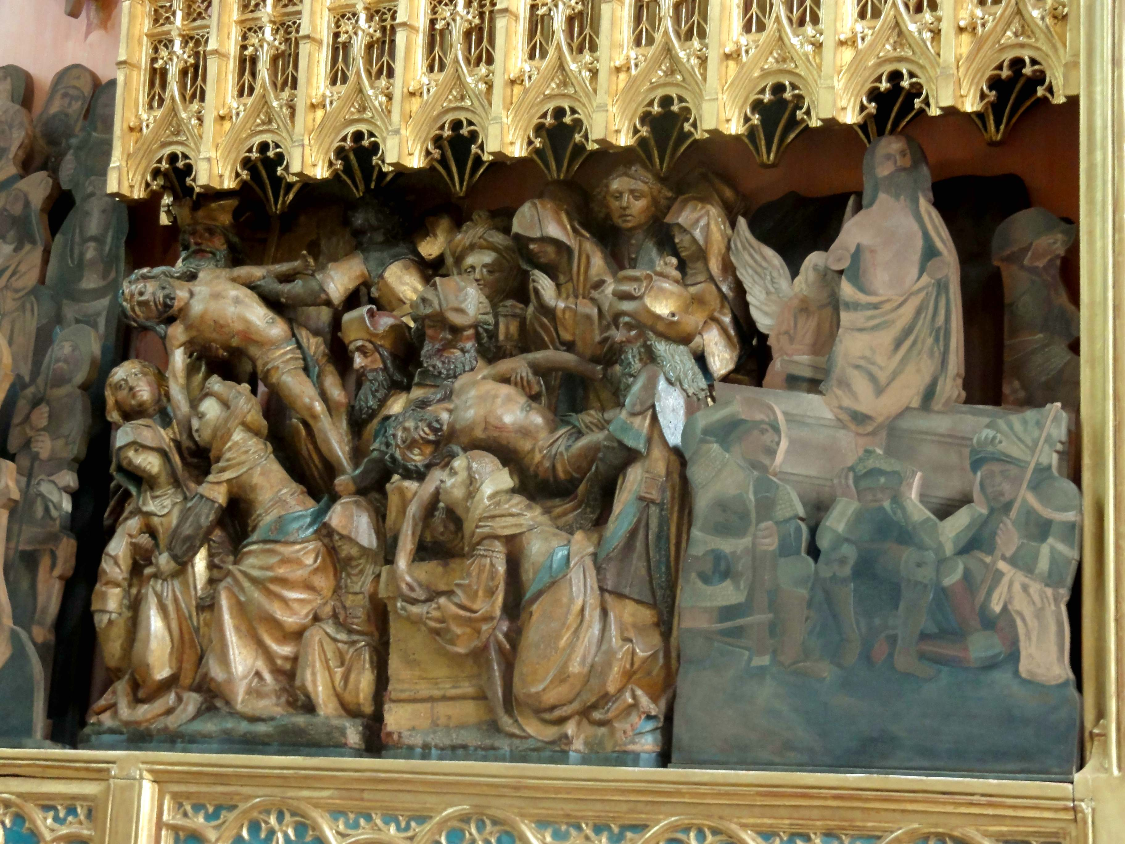 Retable de la Passion, volé en 1934.